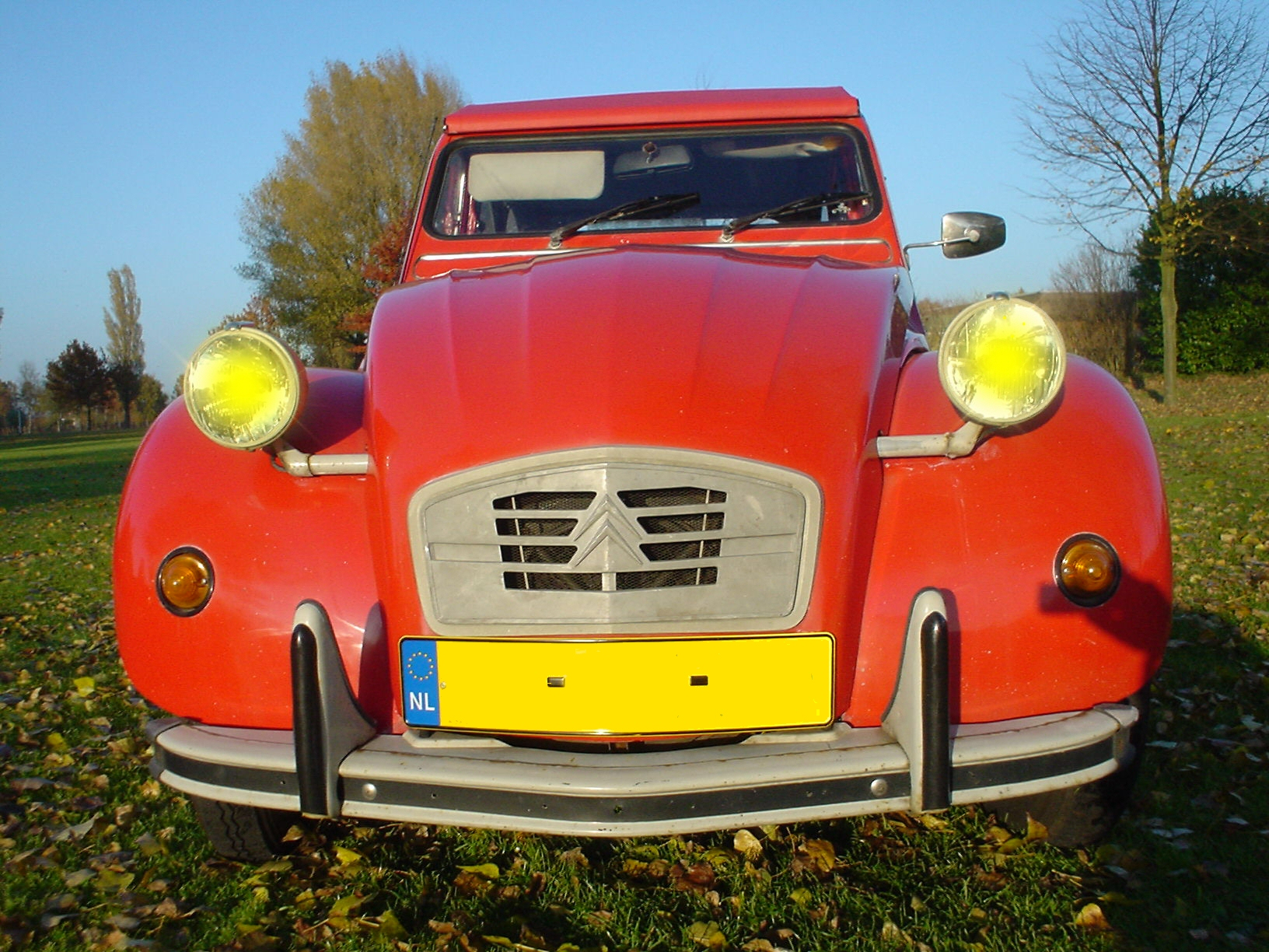 A 1989 Citroen 2CV6 Club